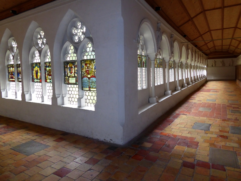 Kloster Wettingen, Kreuzgang